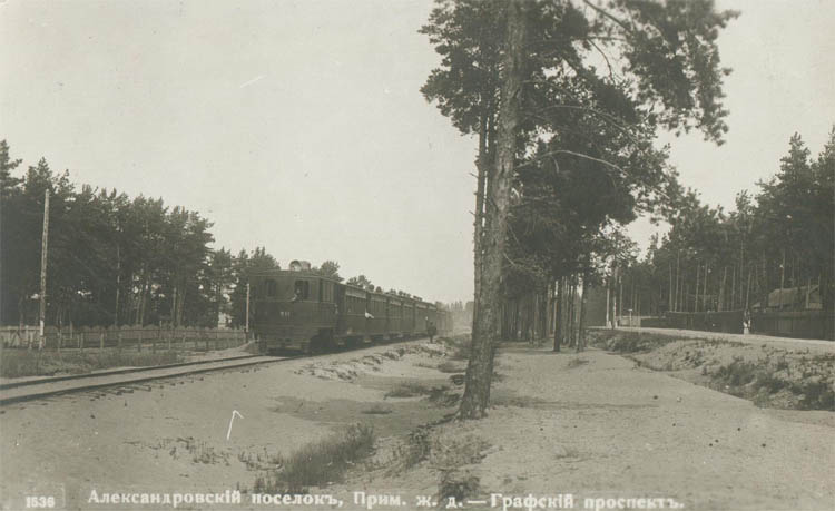 Поезд на Сестрорецкой железной дороге, недалеко от станции Александровская